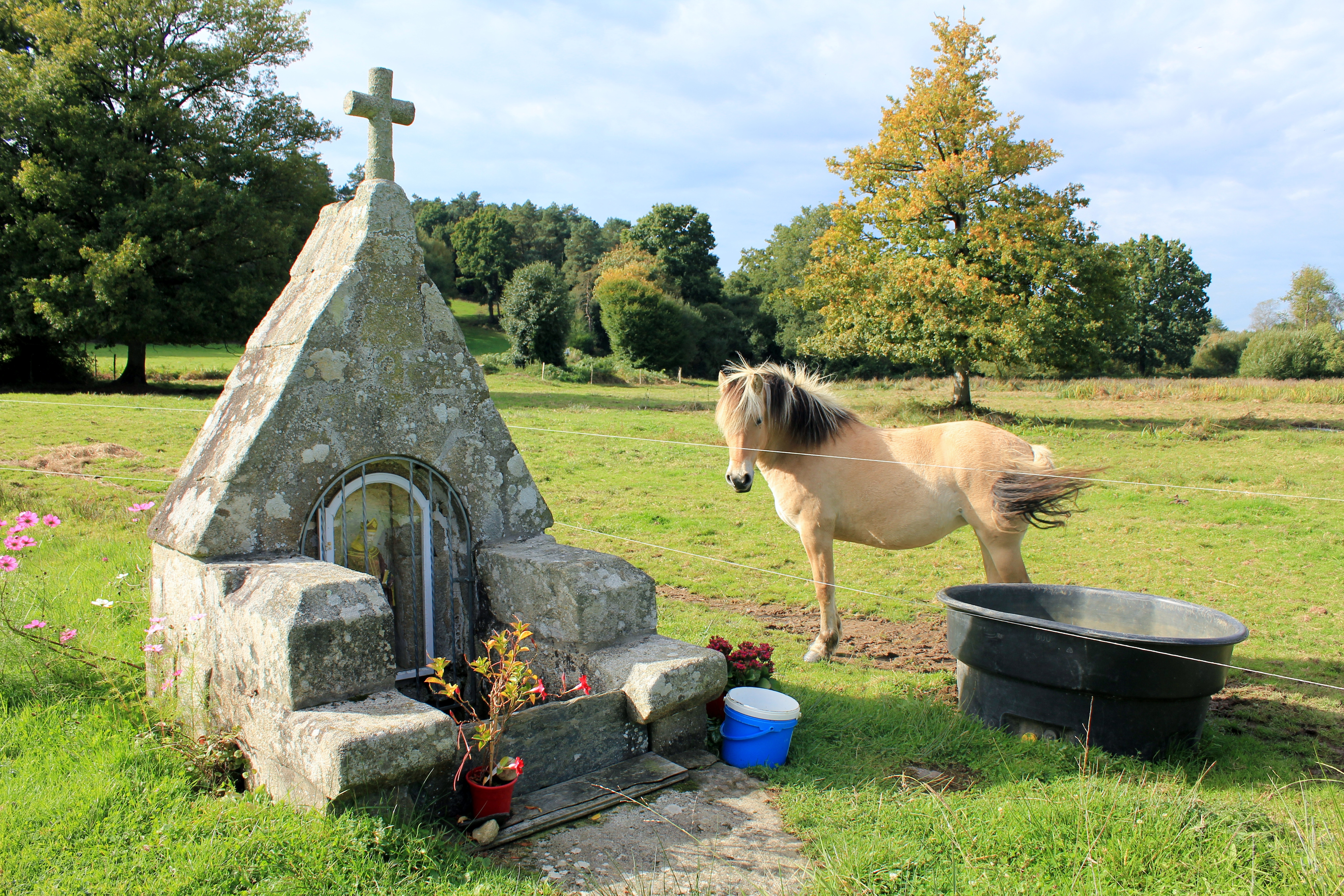 Fontaine Saint-Gobrien (Saint-Servant) : vue de situation de face